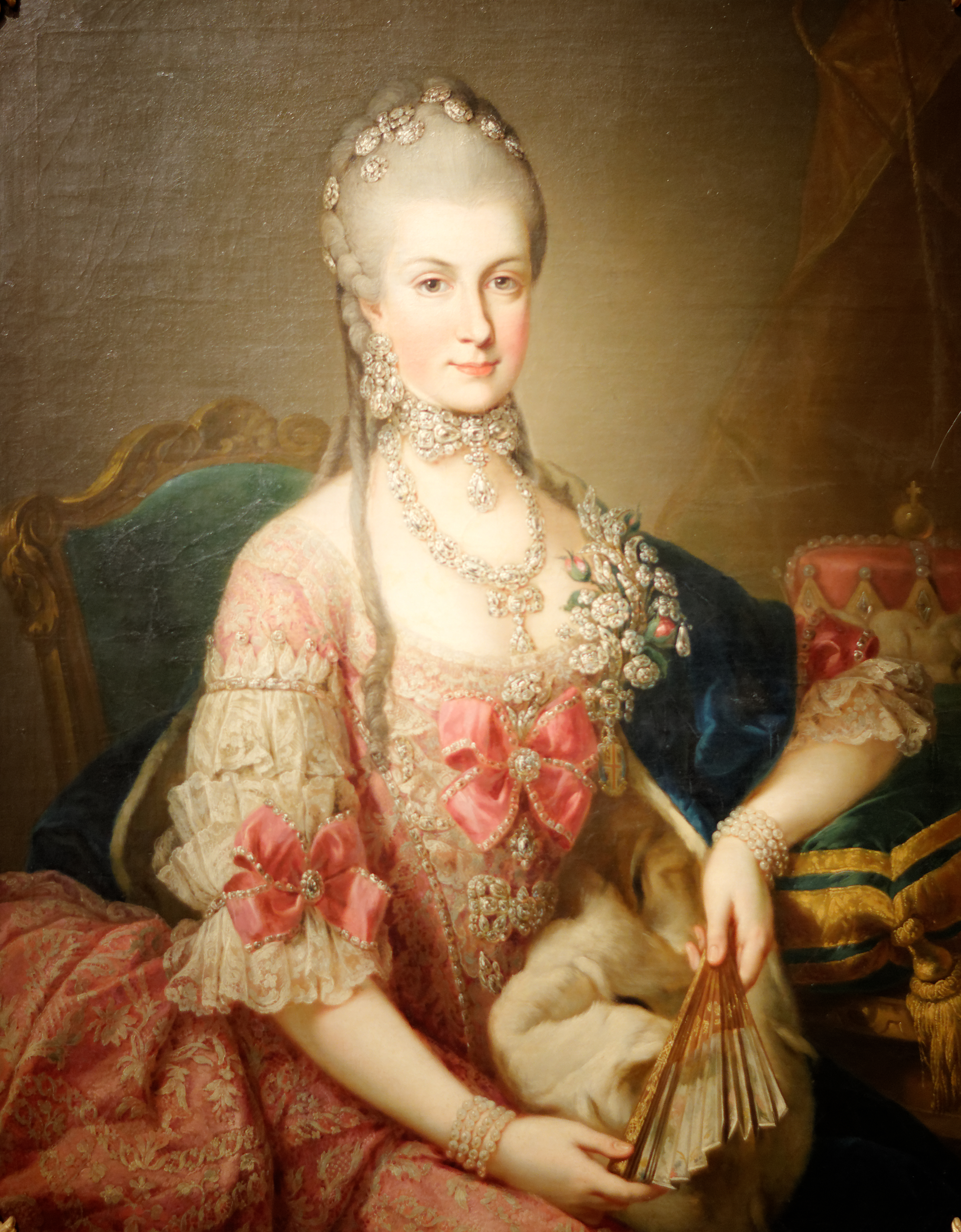 Portrait de Marie-Christine de Habsbourg-Lorraine